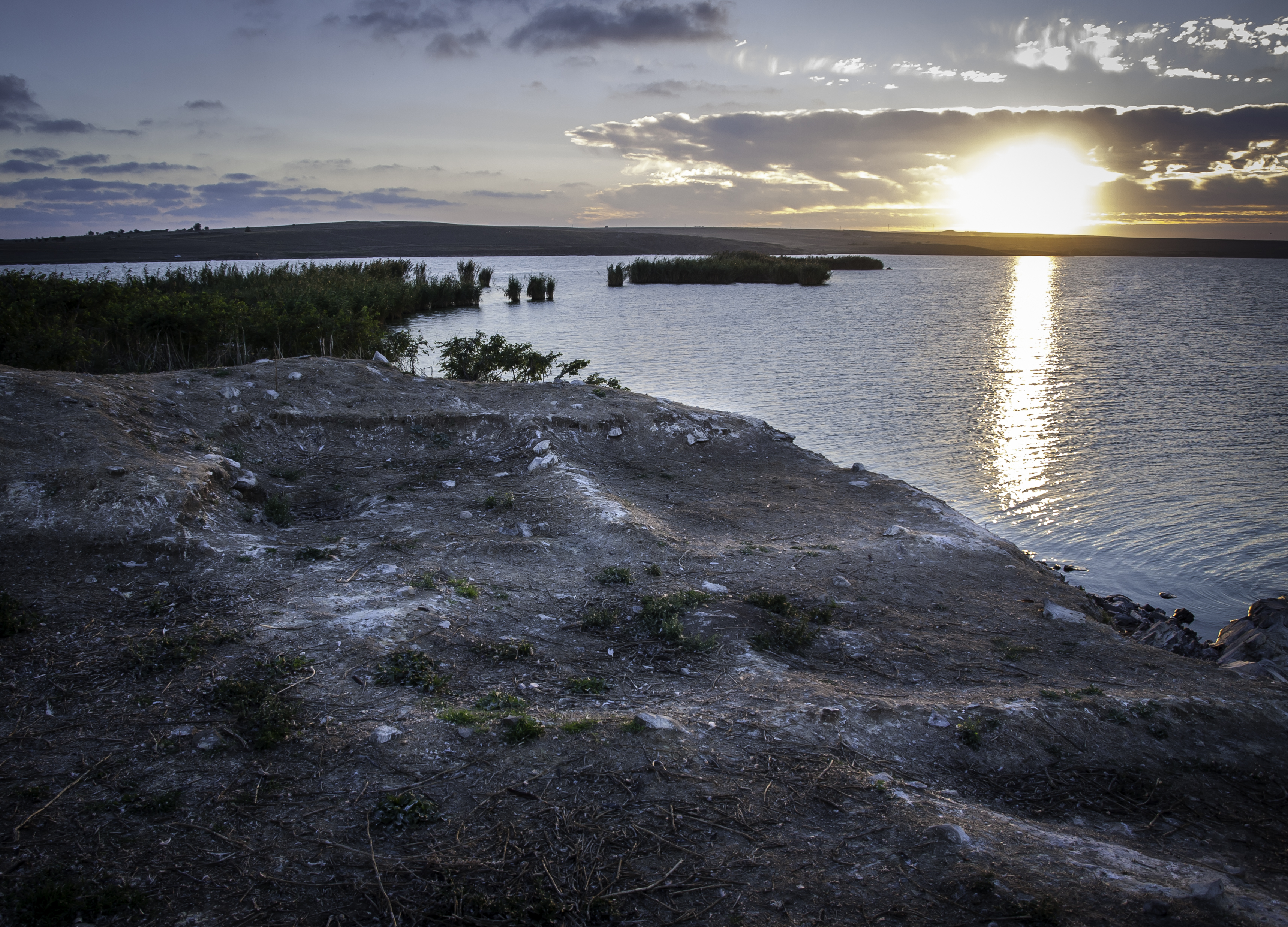 Sit Arheologic - Cultura Gumelnita